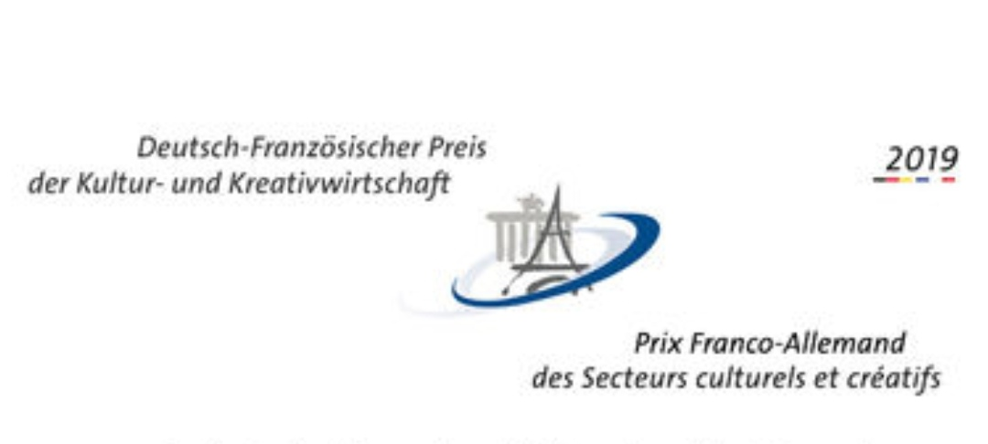 Logo officiel du prix franco-allemand des secteurs créatifs et culturels